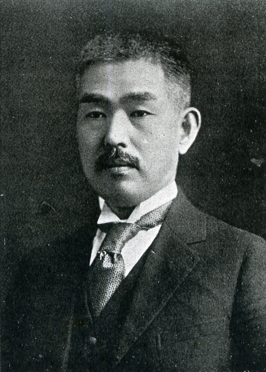 この写真は、金光庸夫（1877-1955）の写真です。